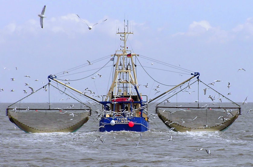 Krabbenkutter Ivonne/Pellworm bei Südfall